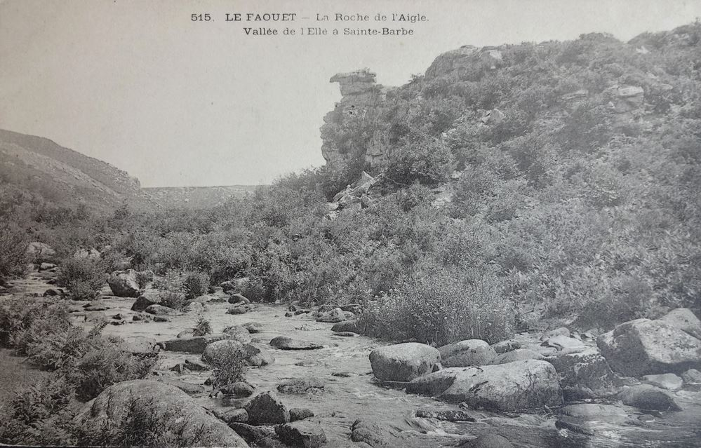 Carte postale ancienne du premier quart du vingtième siècle de la vallée de l'Ellé près de la chapelle Sainte Barbe du Faouët.